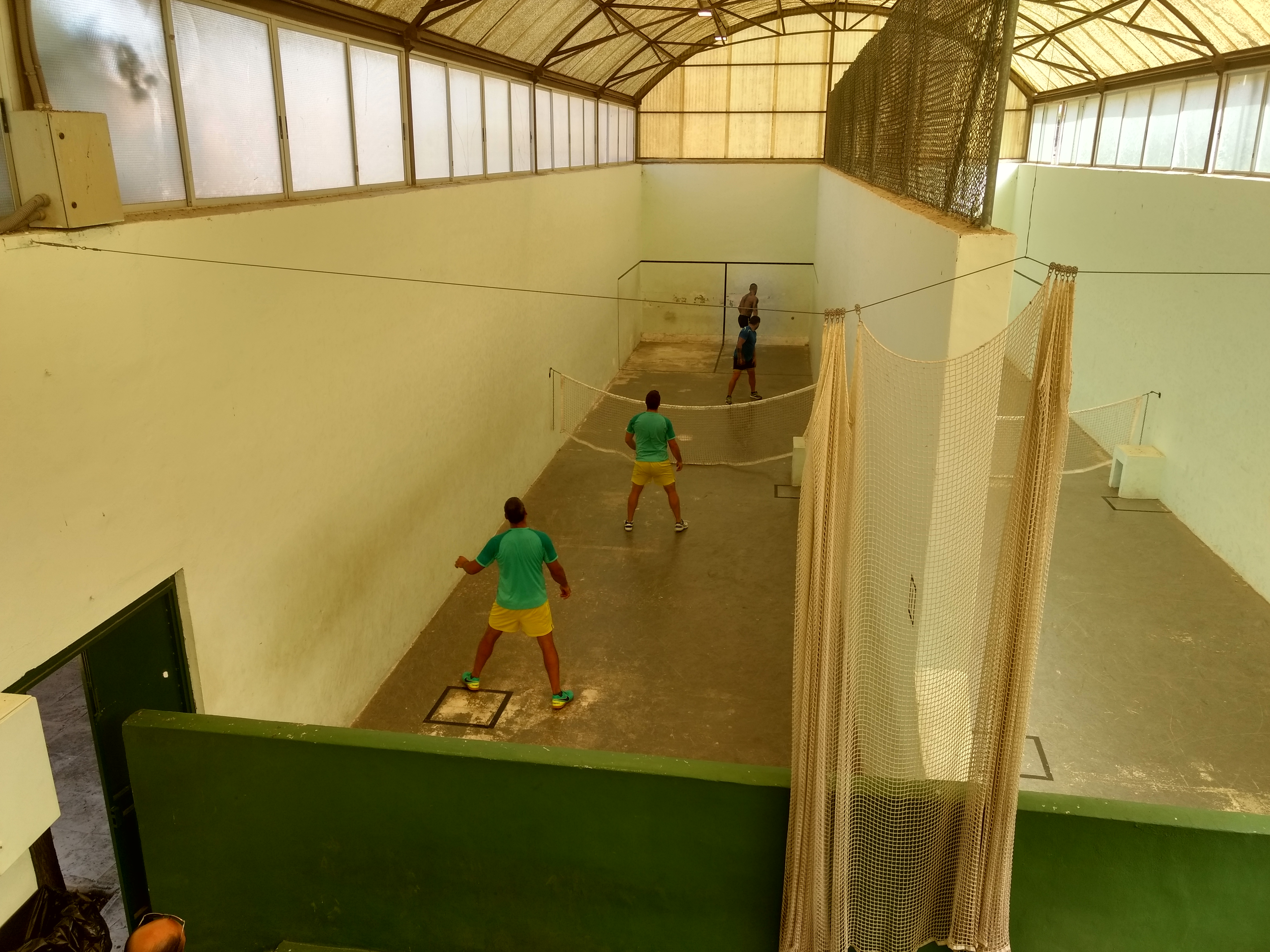 Partida de Llonges al Pinós. Reportatge al número 4 de Ferida.